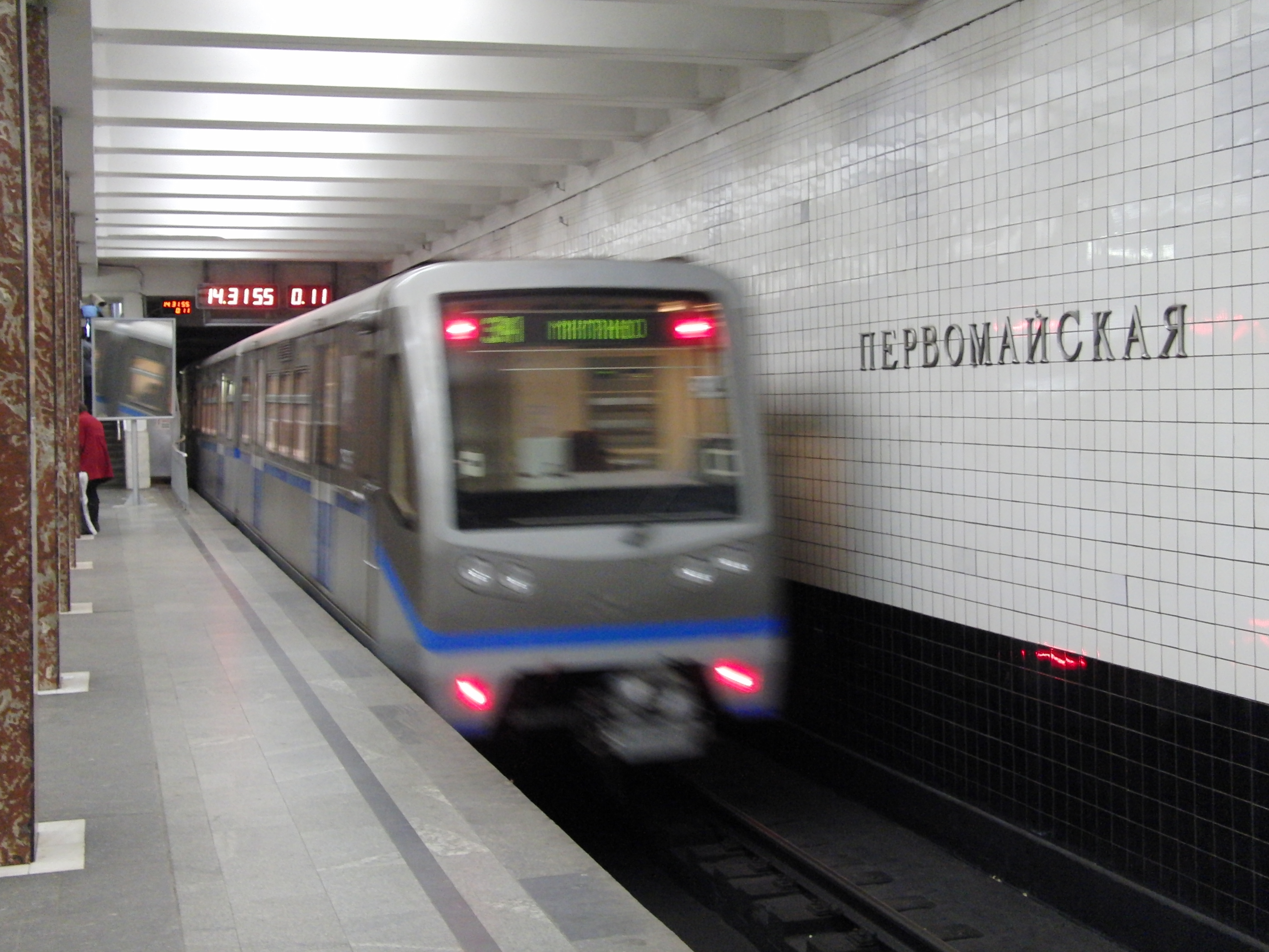 Pervomayskaya (Первомайская)